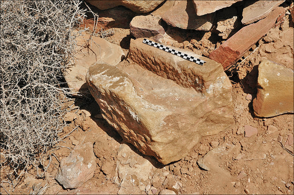 Thermes de Biyarah. Élément de canal en pierre.